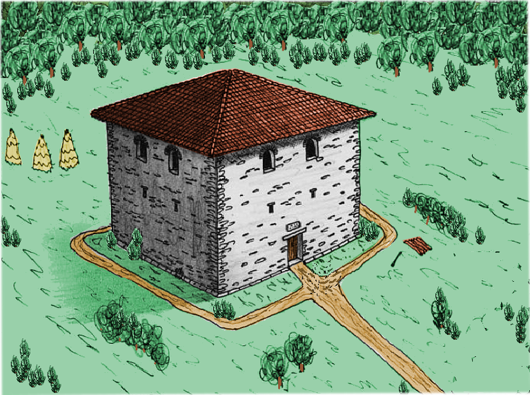 Rekonstruktionsversuch des Burgus von Bacharnsdorf, Zustand im 4. Jahrhundert n.Chr.